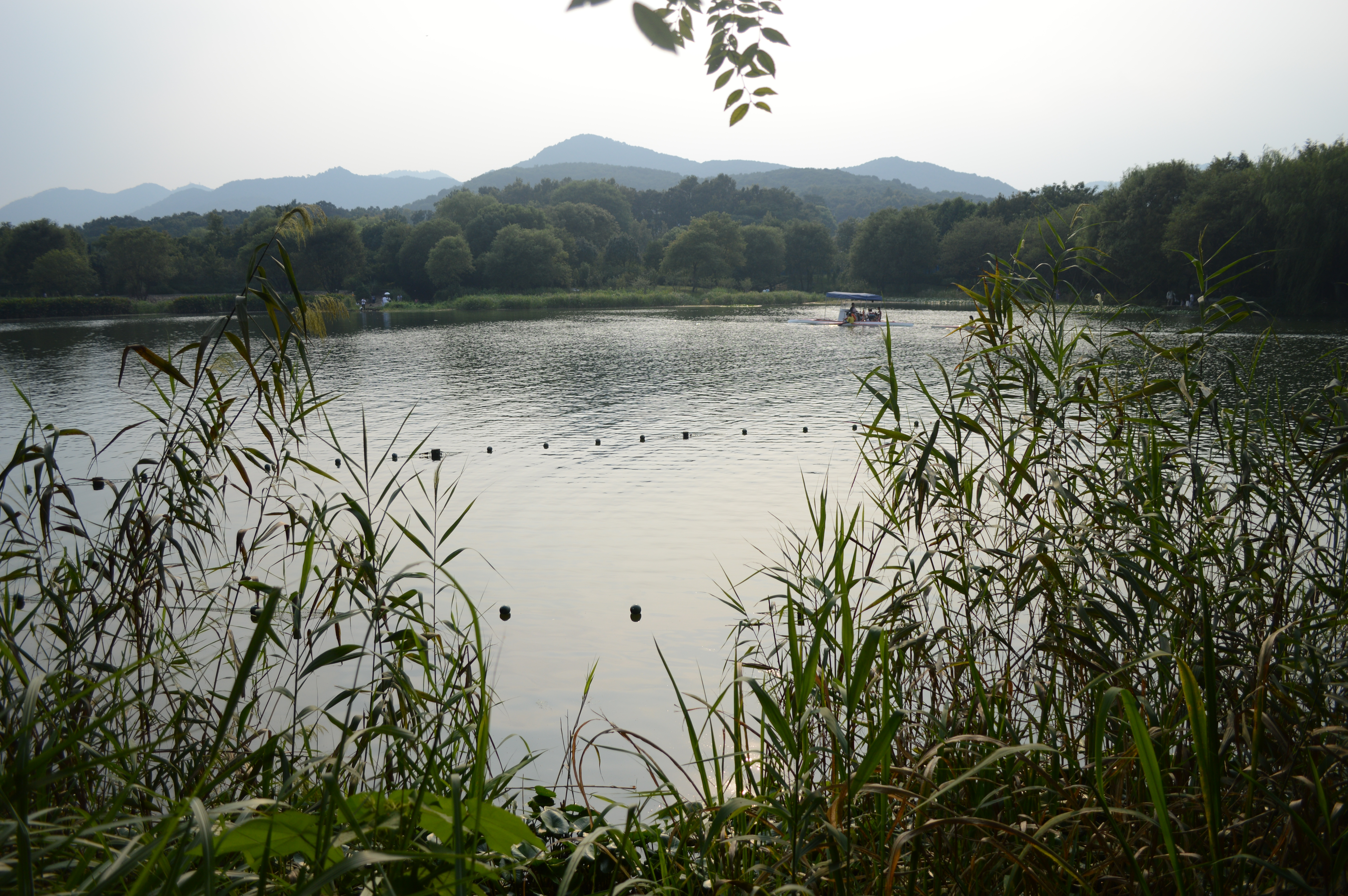 杭州西湖茅家埠景区一景